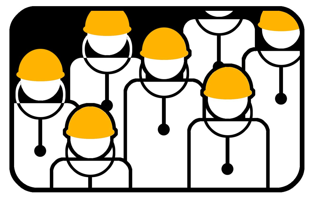 醫師勞動條件改革小組logo